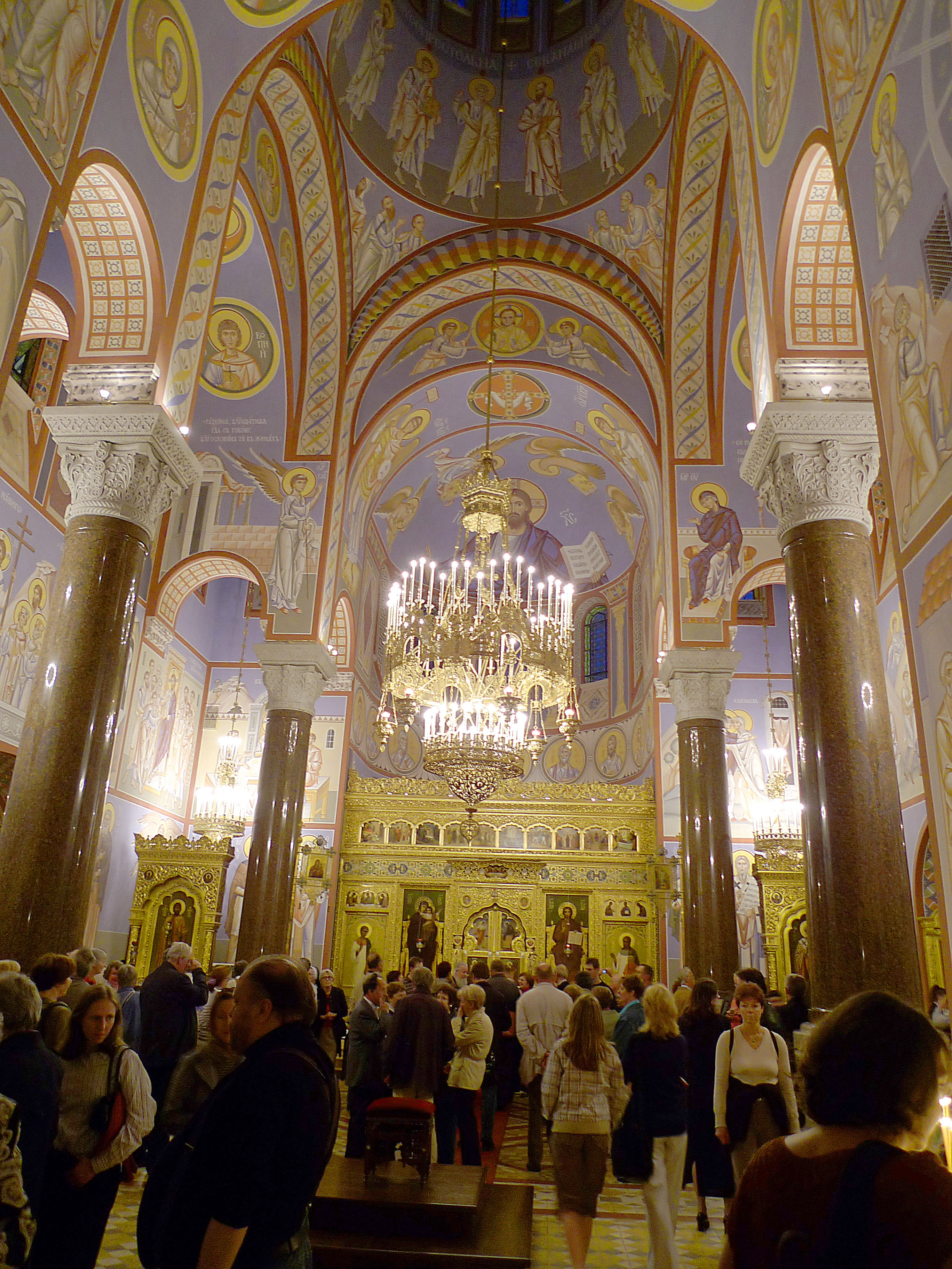 Saint Nicholas Cathedral, Vienna